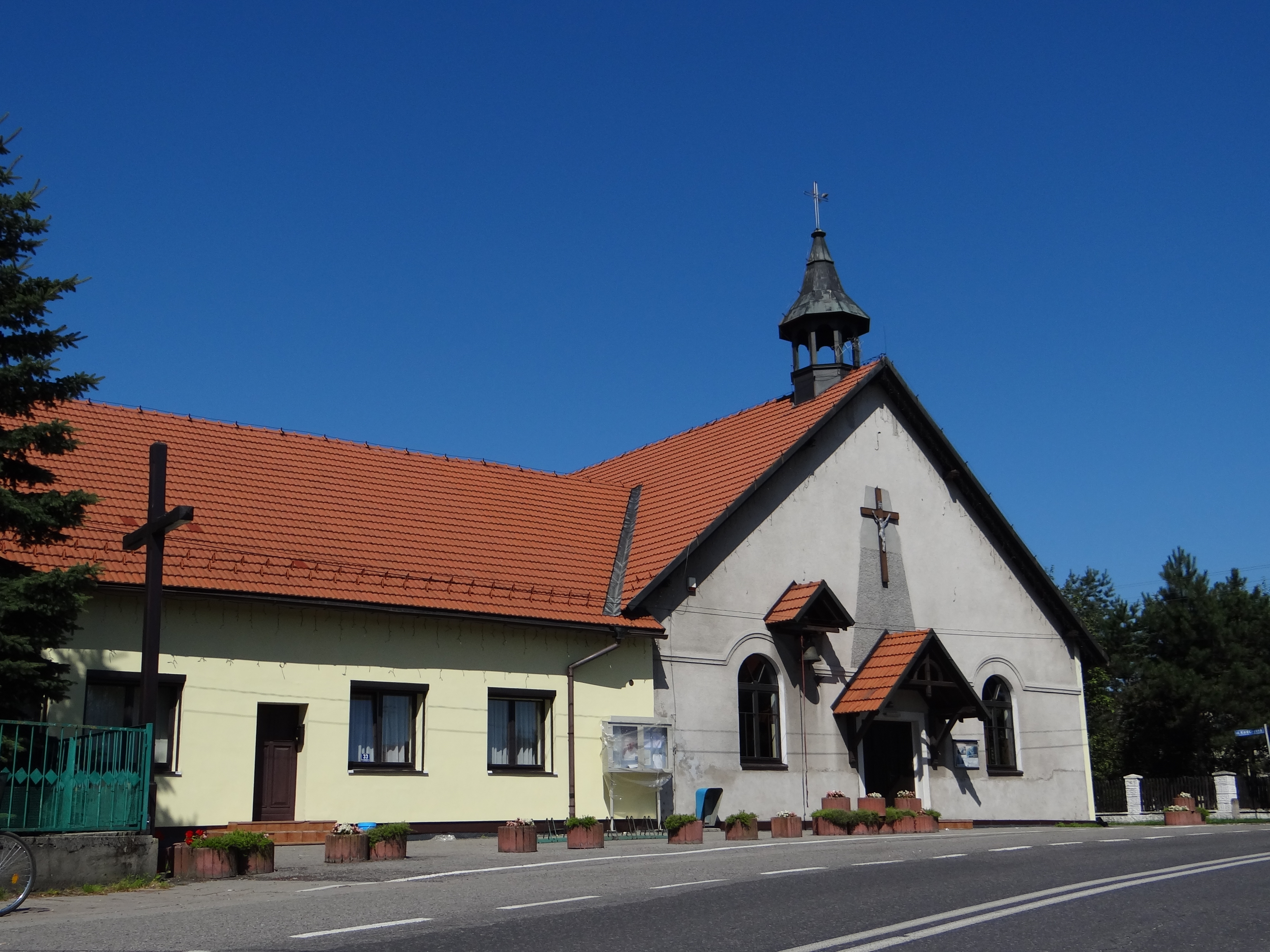 Parafia św. Józefa Robotnika w Czarkowie